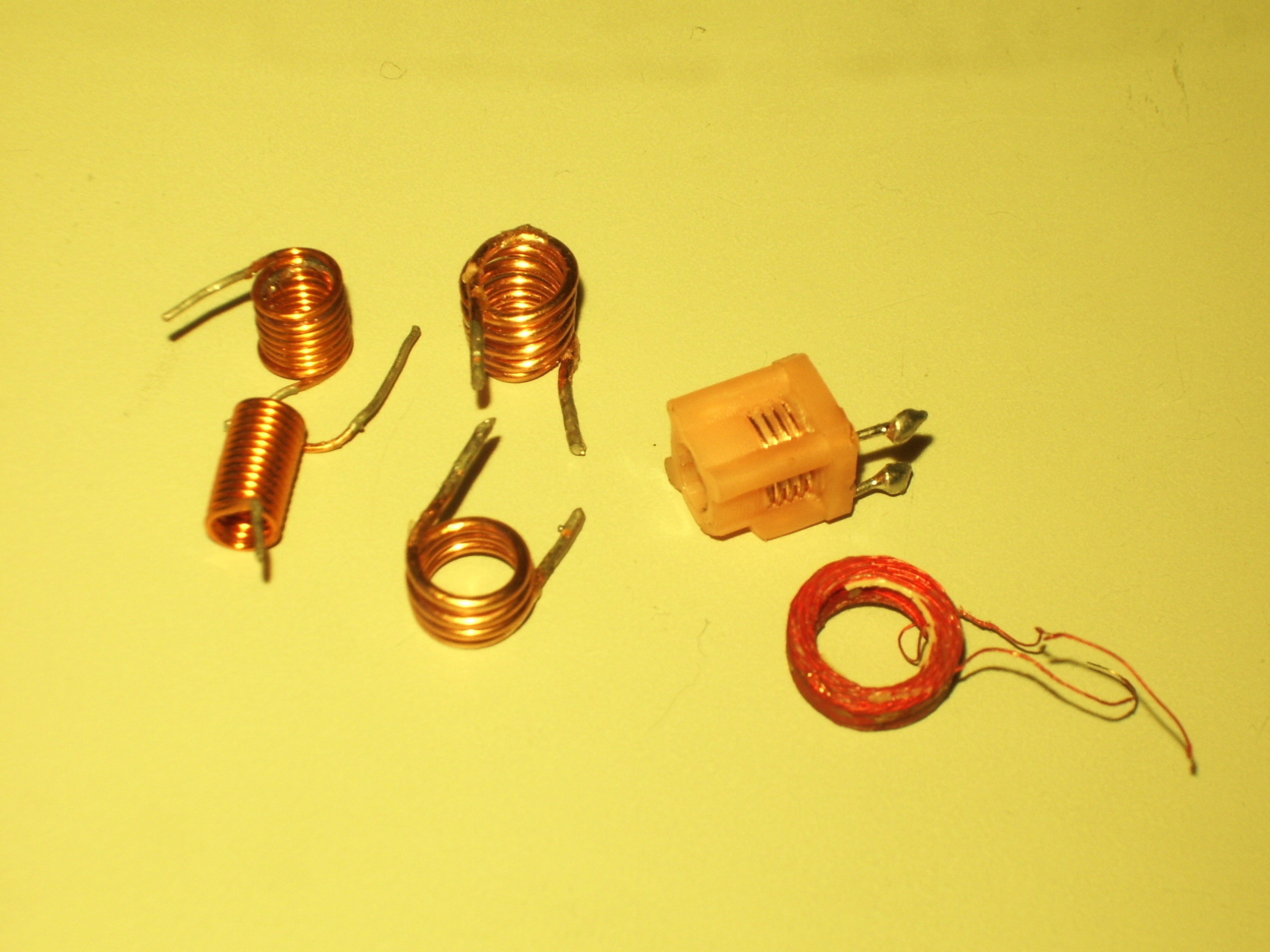 Einige Luftspulen aus Rundfunkgeräten. Links: Einlagige Zylinderspulen, freitragend. Mitte: Einlagige Zylinderspule auf Kunststoffkern (Induktiviät: je. ca. 100 nH). Rechts: Mehrlagige Wickelspule, freitragend (Induktivität: ca. 100 µH). Foto selbst aufgenommen.